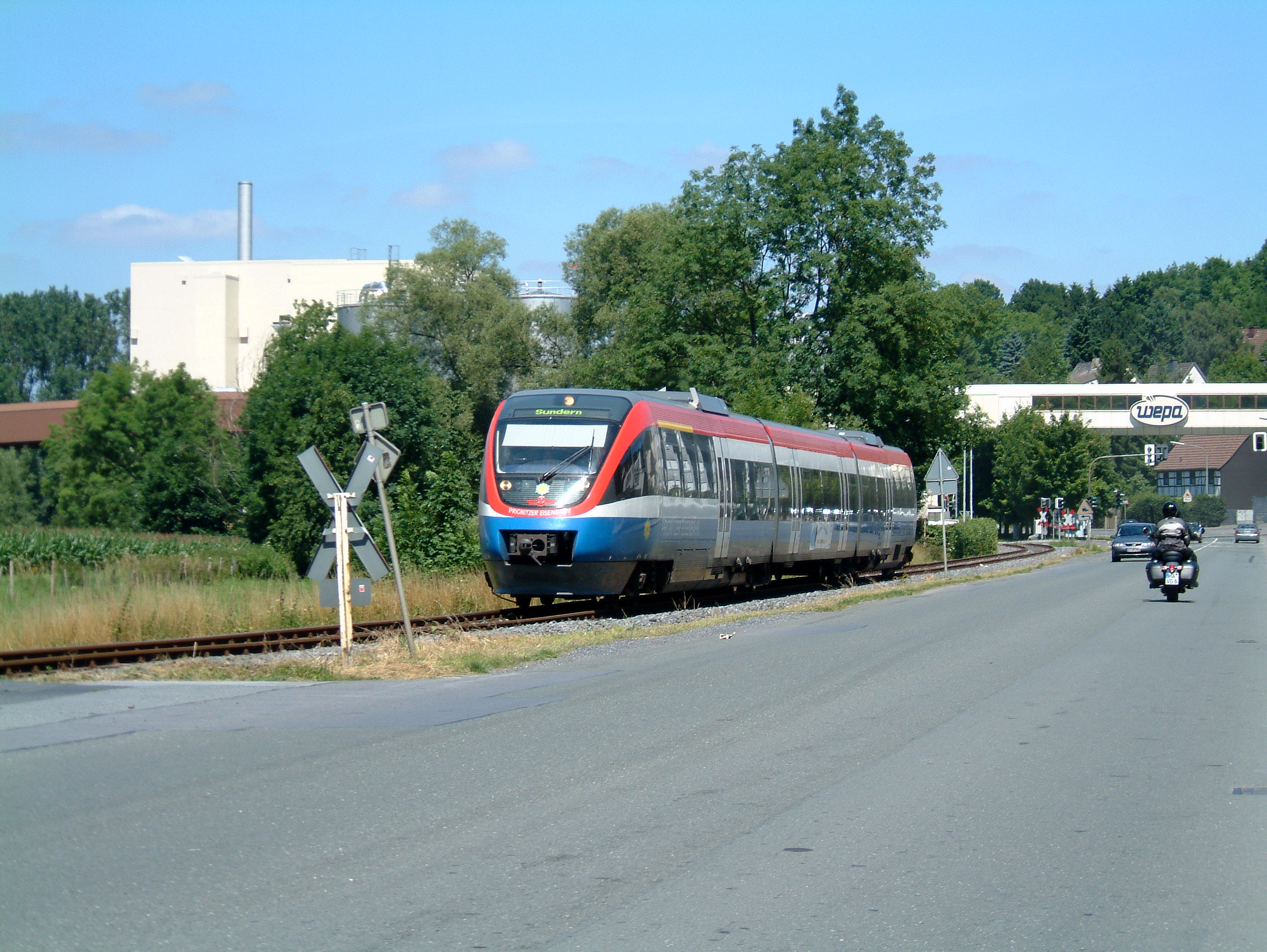 VCD-Sonderfahrt mit Bombardier Talent der Prignitzer Eisenbahn auf der Röhrtalbahn.